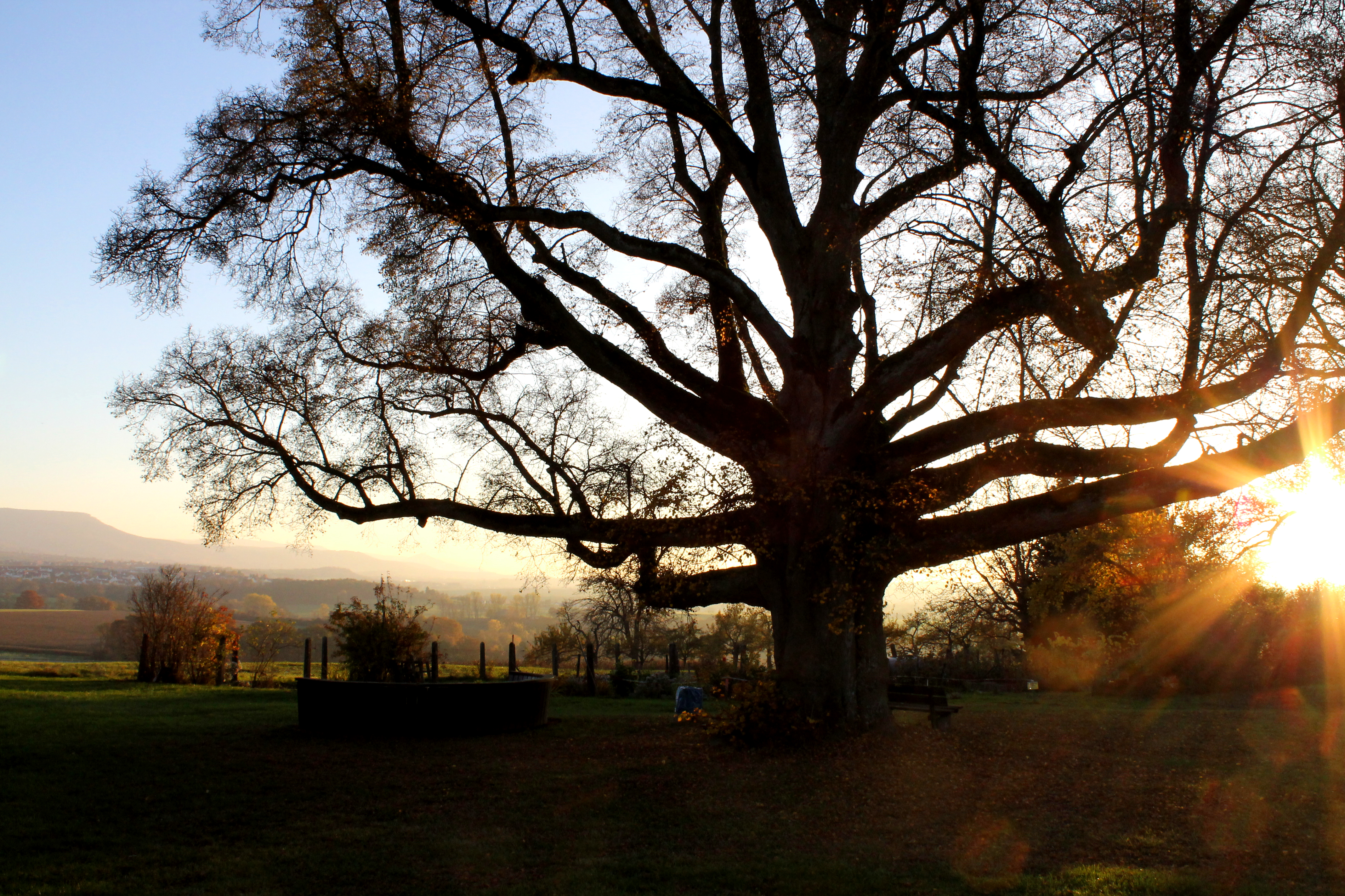 Dorflinde mit Festplatz bei Gomaringen-Stockach